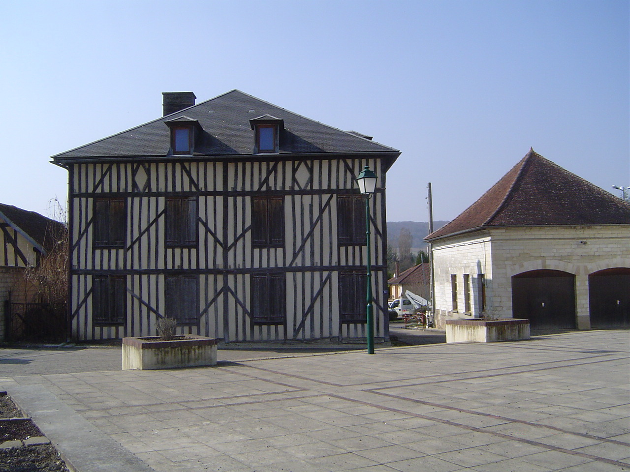 Bouilly - A gauche du foyer familial